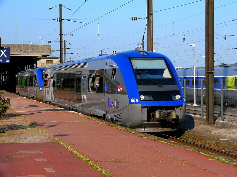 X 73900 Alsace en décoration TER "neutre" sur une course TER Lorraine Metz - Sarrebruck